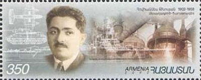 Почтовая марка Армении - Тевосян Иван Фёдорович, Герой Социалистического Труда